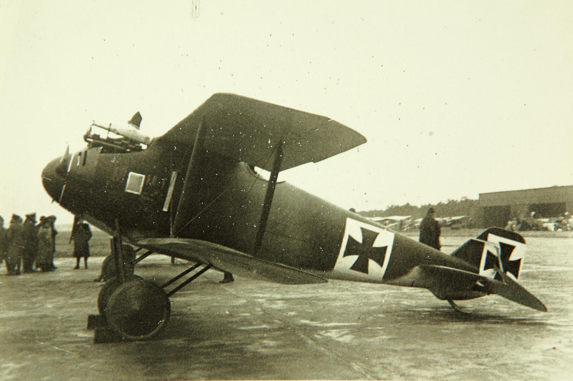 Roland D.I "Haifisch"